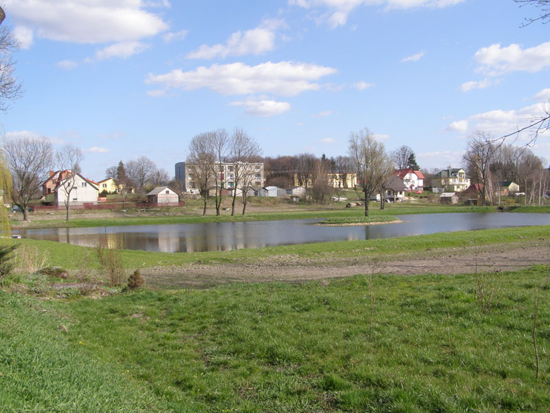 PL, Poland, lubelskie, Wojsławice